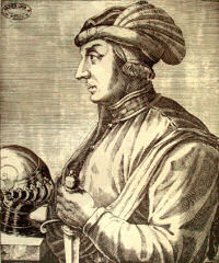 Castruccio Castracani degli Antelminelli (Lucca, 1281 – Lucca, 3 settembre 1328) è stato un condottiero italiano.